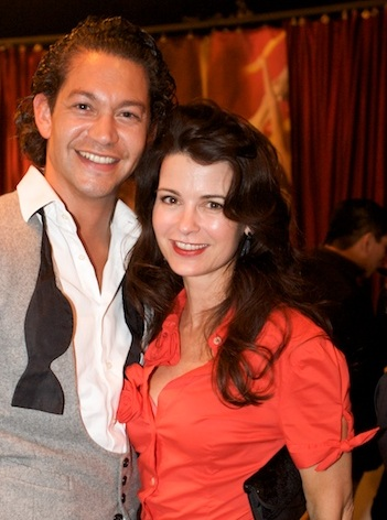 Actrice Caroline de Bruijn (r) bij de Europese première van het Cirque du Soleil in Amsterdam (oktober 2010)